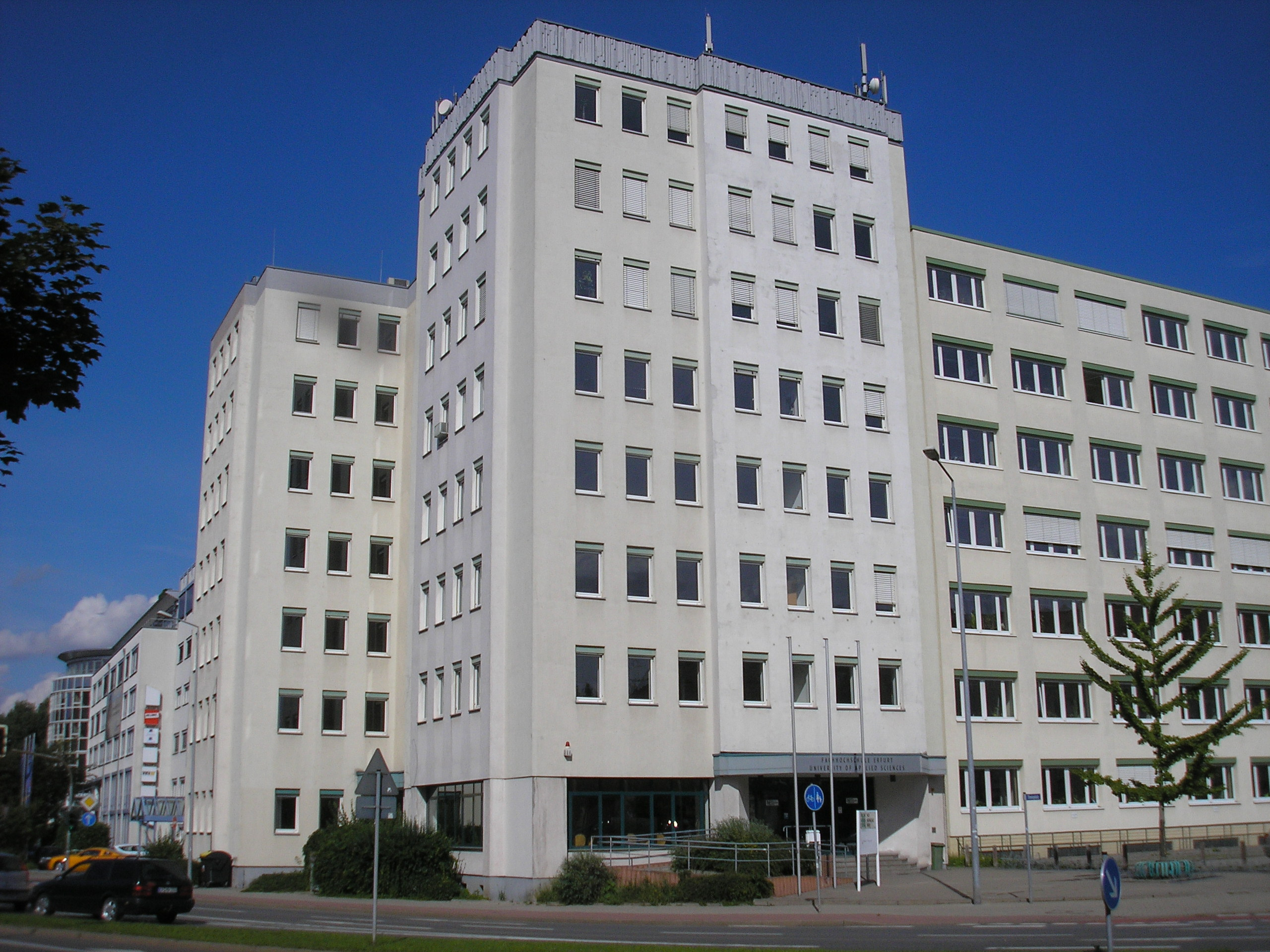 Ein Bürokomplex mit Fachhochschule am Steinplatz in Erfurt.